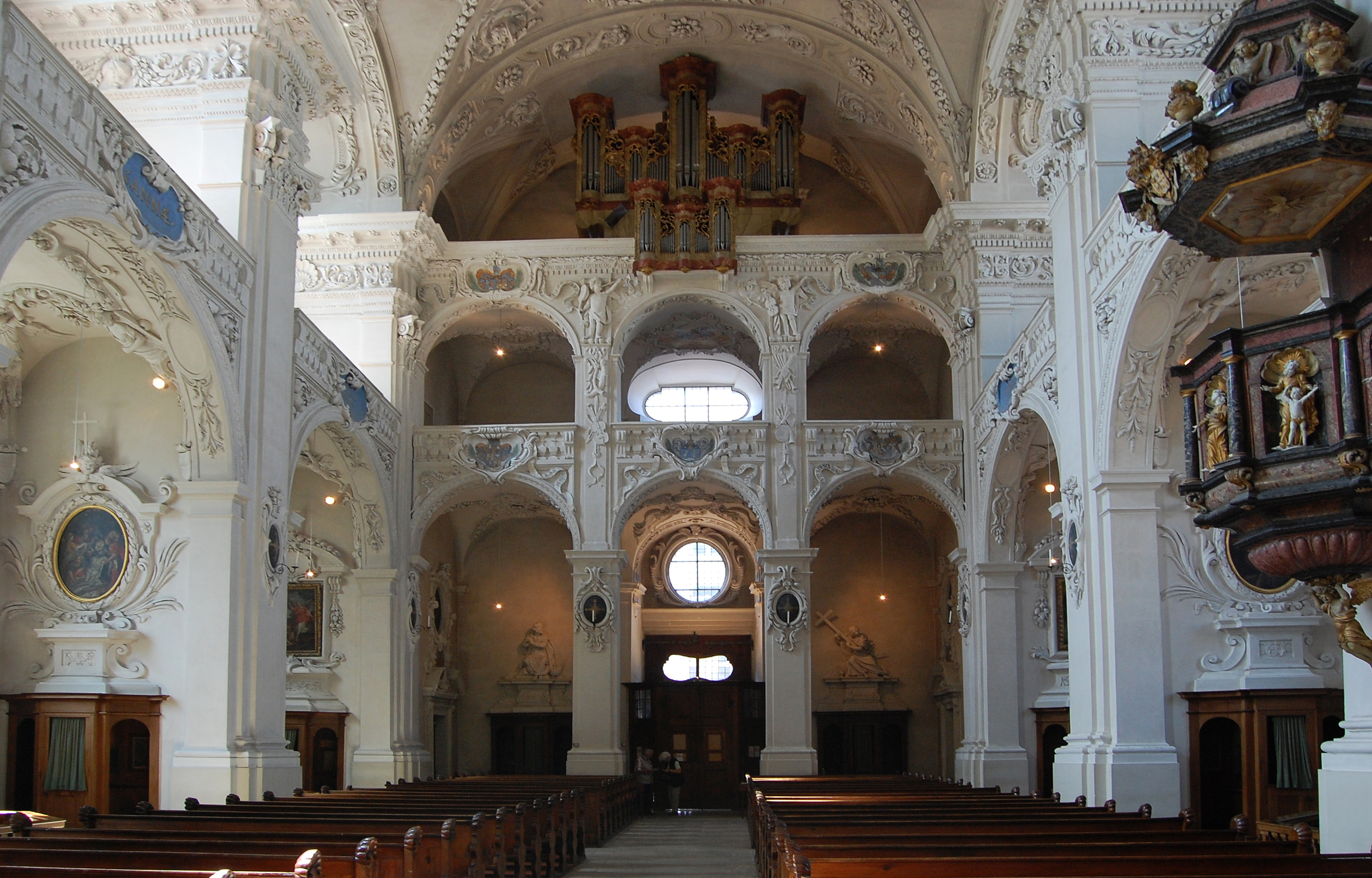 Cathédrale des Jésuites, Soleure Intérieur